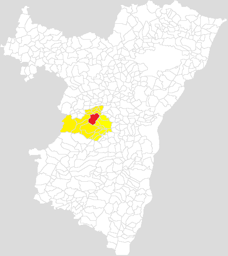 Cartographie